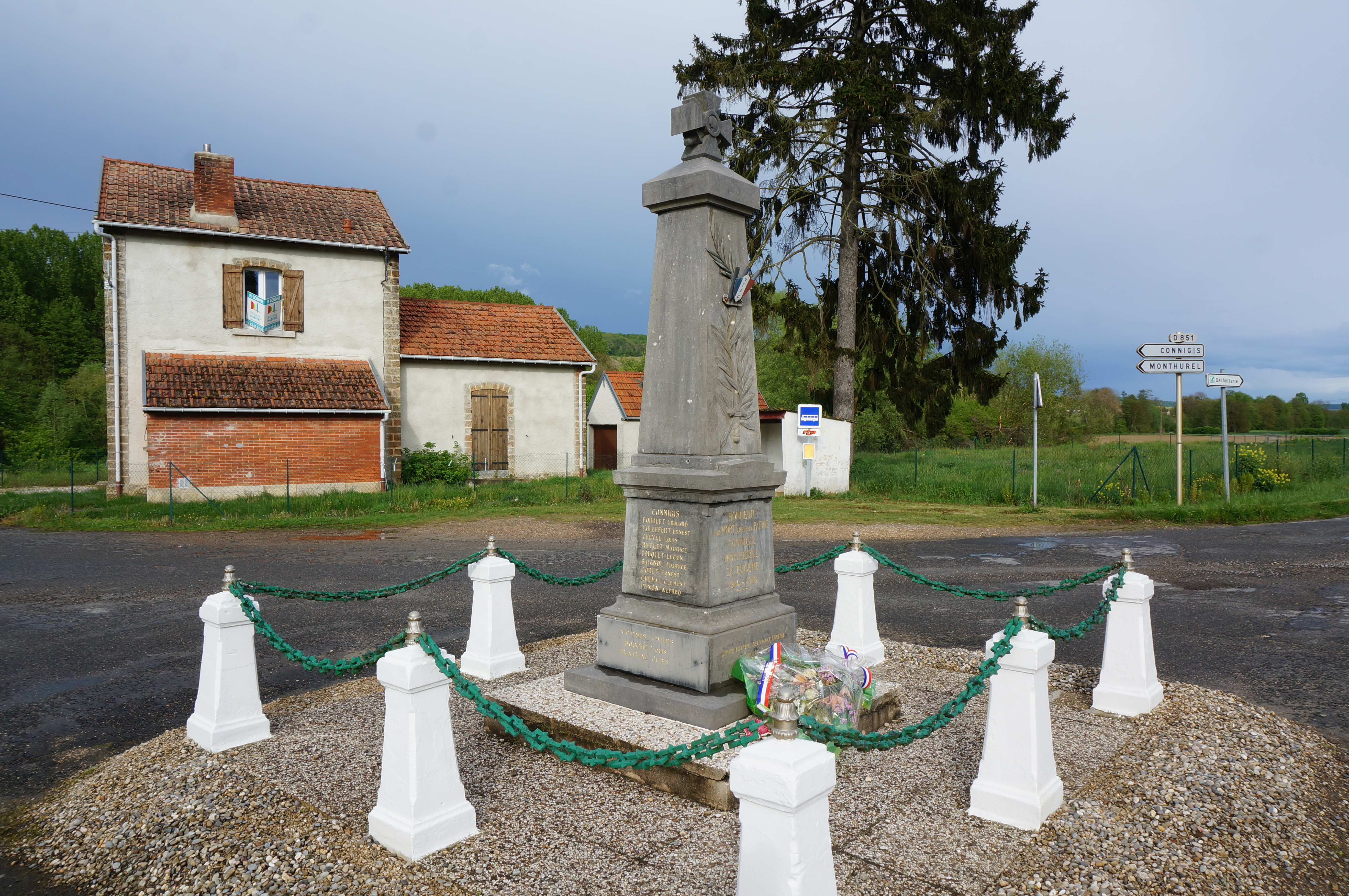 à Connigis.